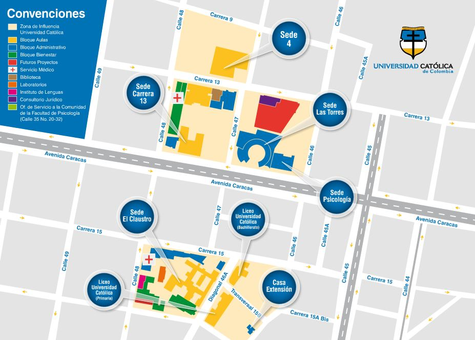 Mapa UCDC Bogotá , Colombia